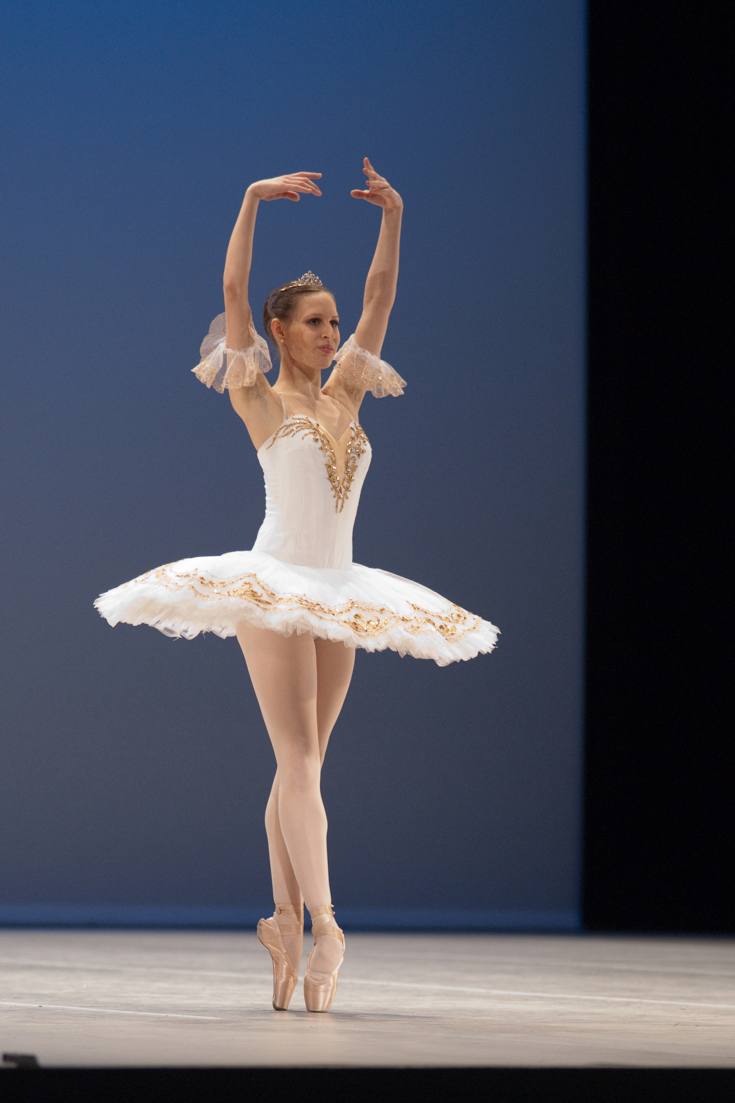 Variation extraite de Raymonda au Prix de Lausanne 2010. The making of this document was supported by Wikimedia CH. (Submit your project!) For all the files concerned, please see the category Supported by Wikimedia CH.